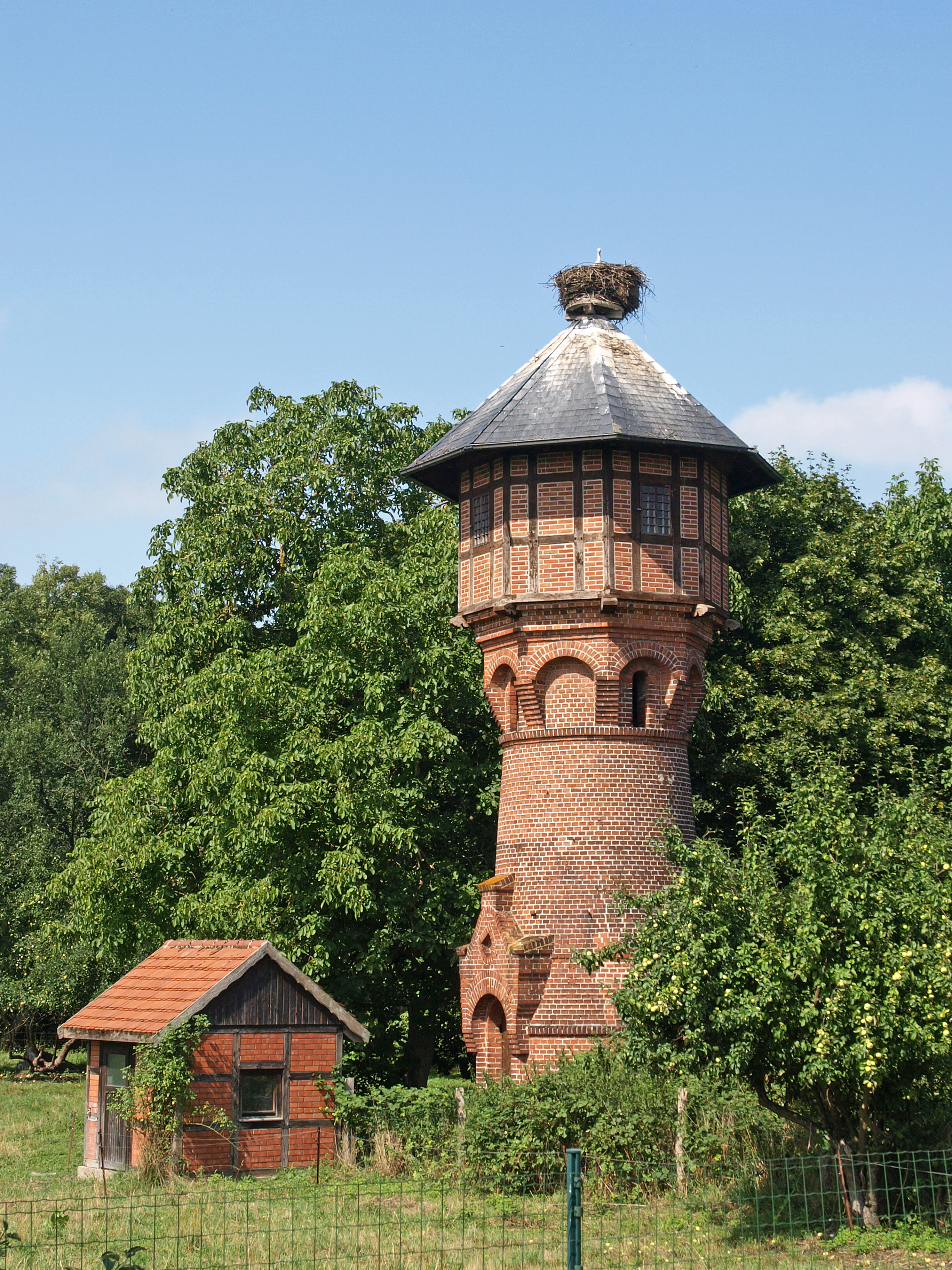 Wasserturm in Rühstädt